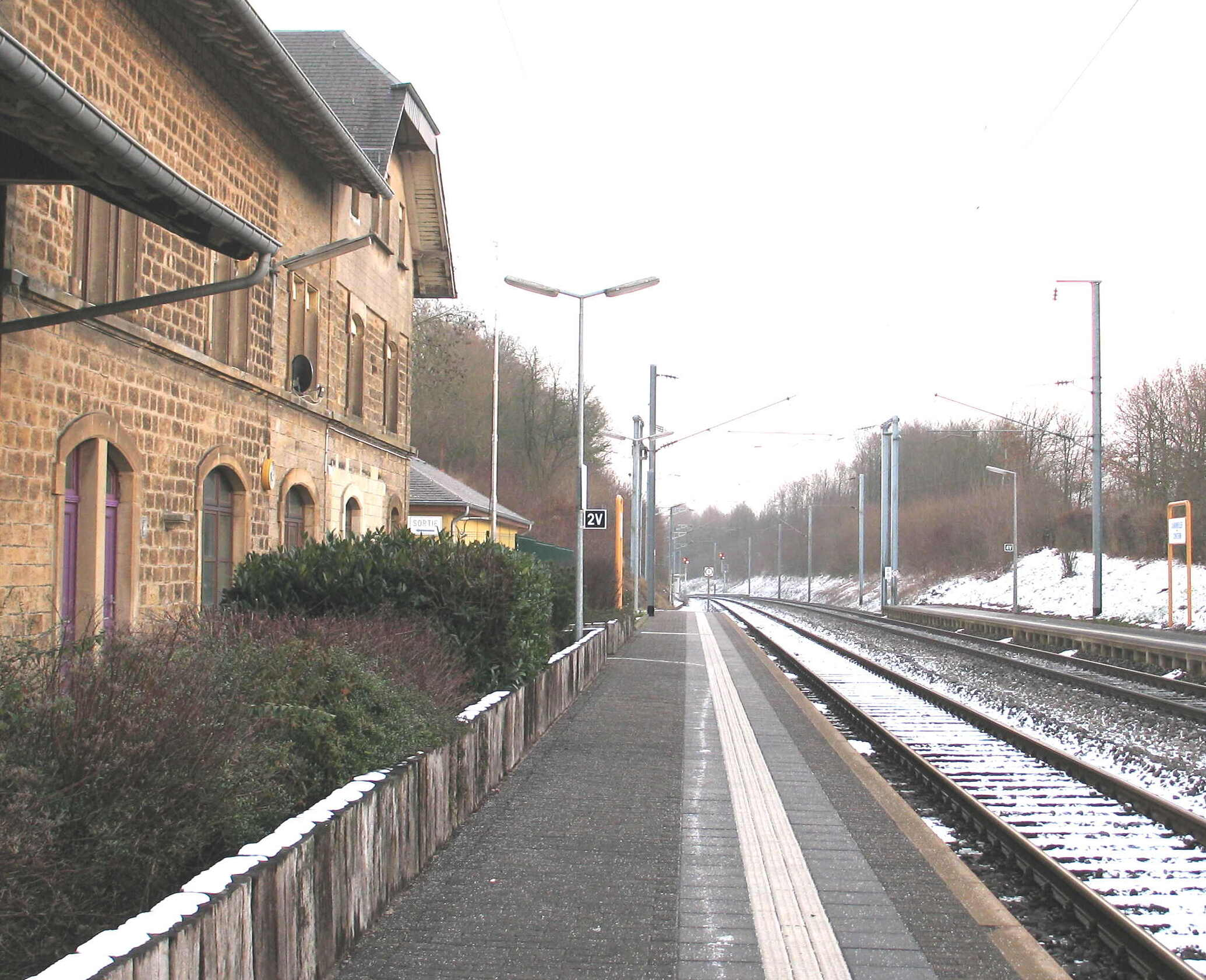 Gare Sandweiler-Conter